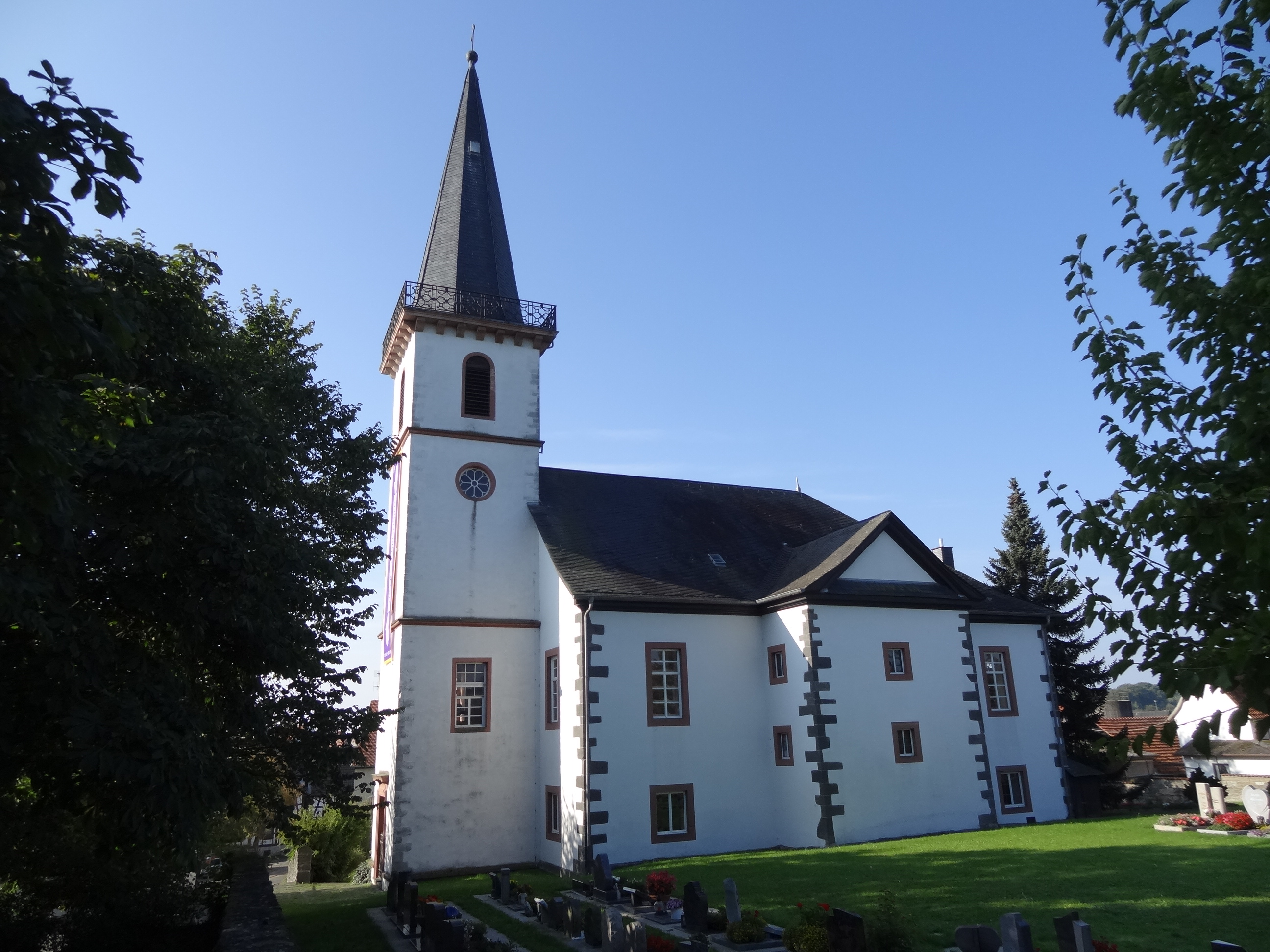 Evangelische Kirche Bellersheim